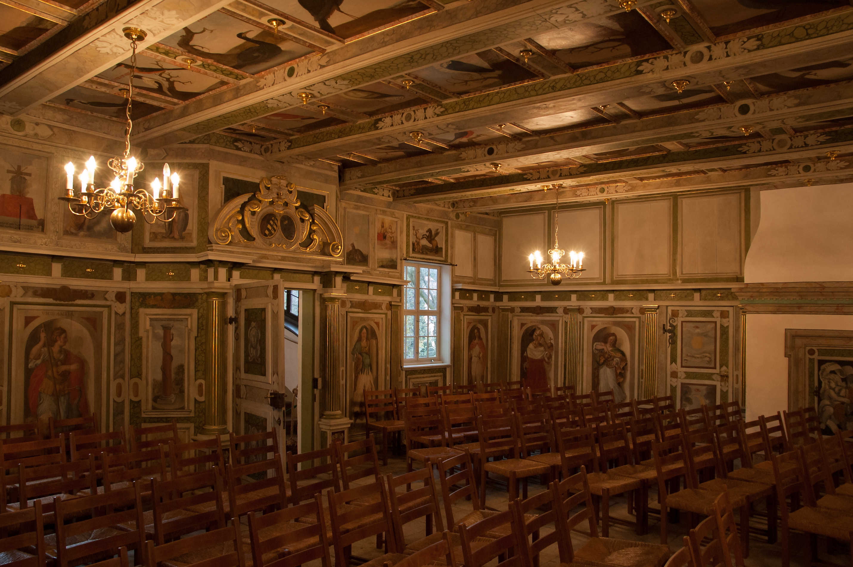 Der Festsaal des Weingutes Hoflößnitz